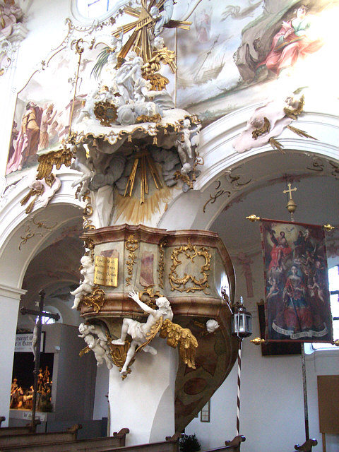 Gutenzell, Germany: ehem. Klosterkirche, Kanzel von Stephan Luidl